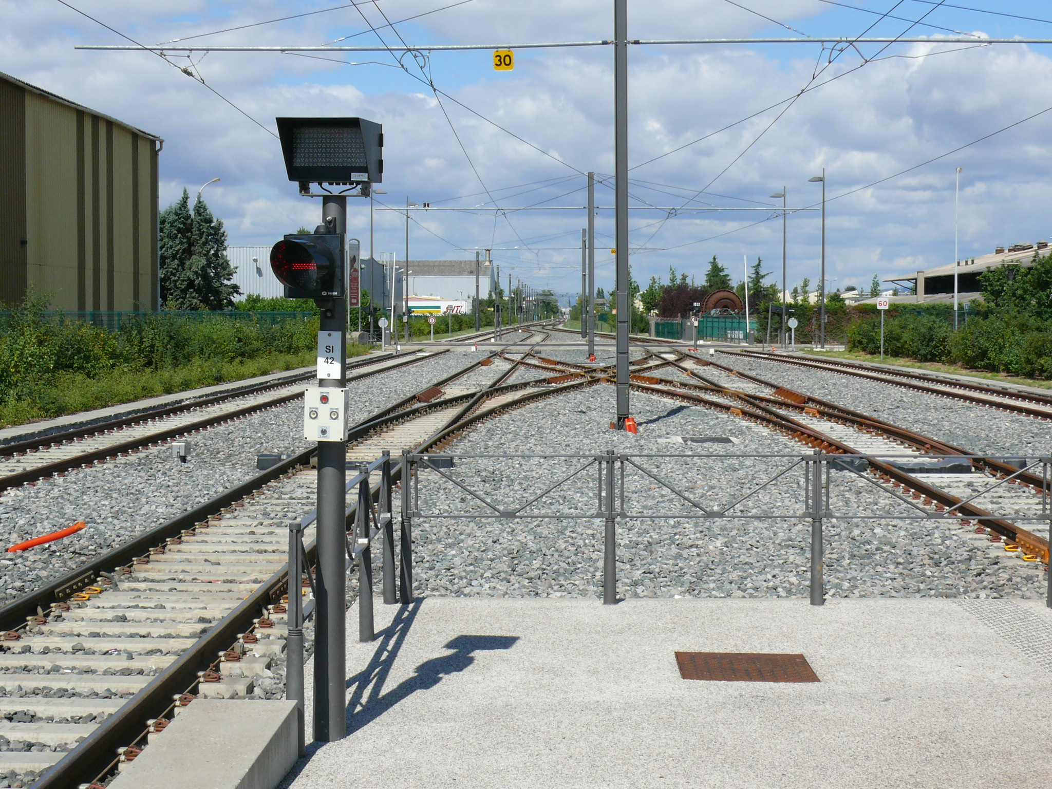 Tramway de Lyon — T3 et Rhônexpress : Appareils de voie de l'avant gare de Meyzieu. Les deux voies centrales constituent le terminus de la ligne T3, et les deux voies extérieures serviront au passage des rames de Rhônexpress, la liaison rail-aéroport desservant l'aéroport de Lyon Saint-Exupéry. La bretelle double visible au premier plan vient d'être installée, dans le cadre des travaux de mise en service de Rhônexpress. En effet, depuis la mise en service de T3, seule la voie à gauche du quai était utilisée par T3 en service commercial.